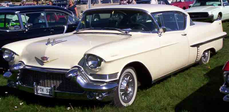 1957 Cadillac Series 57-6237(X) Hardtop-Coupe